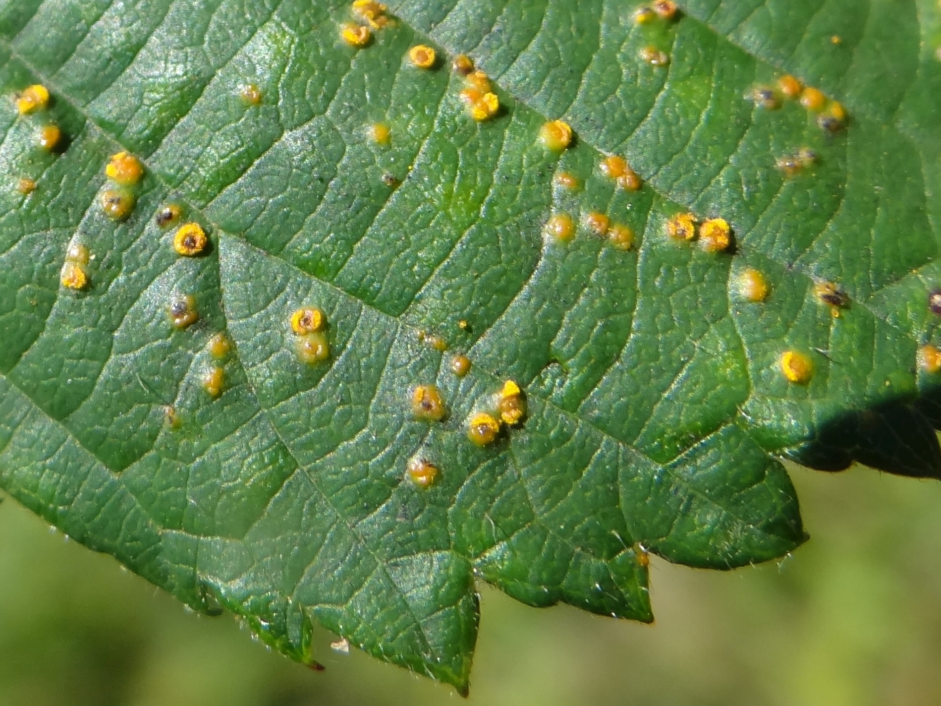 Phragmidium rubi-idaei. Location: Poland, Trzciana, województwo małopolskie